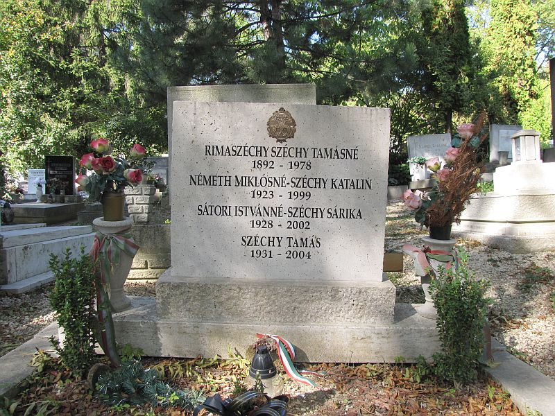 Széchy Tamás (Doboz, 1931. március 27. – Budapest, 2004. szeptember 13.) úszóedző sírja Budapesten. Farkasréti temető: 28.